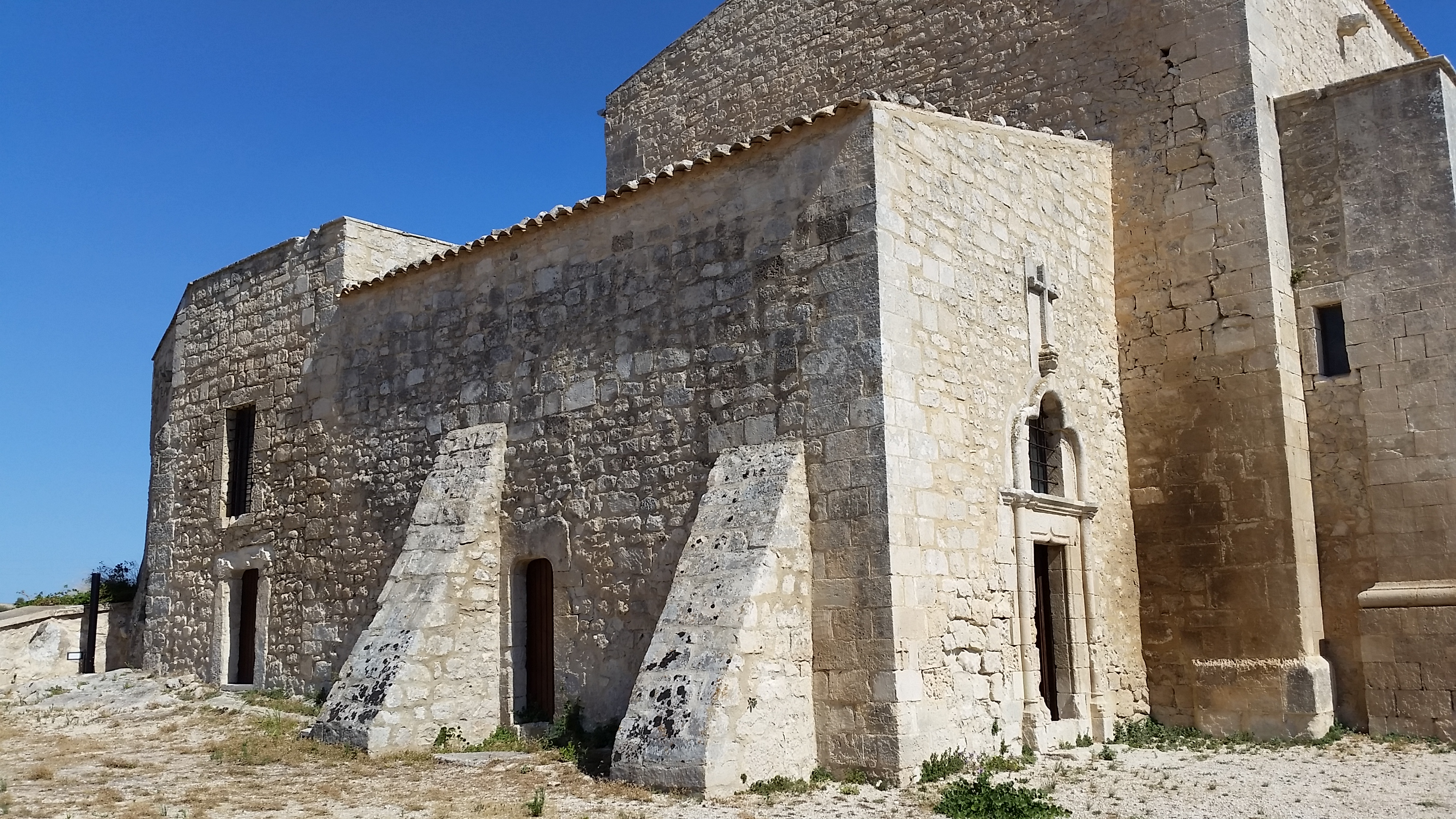 Oratorio della Madonna di Sion, Scicli